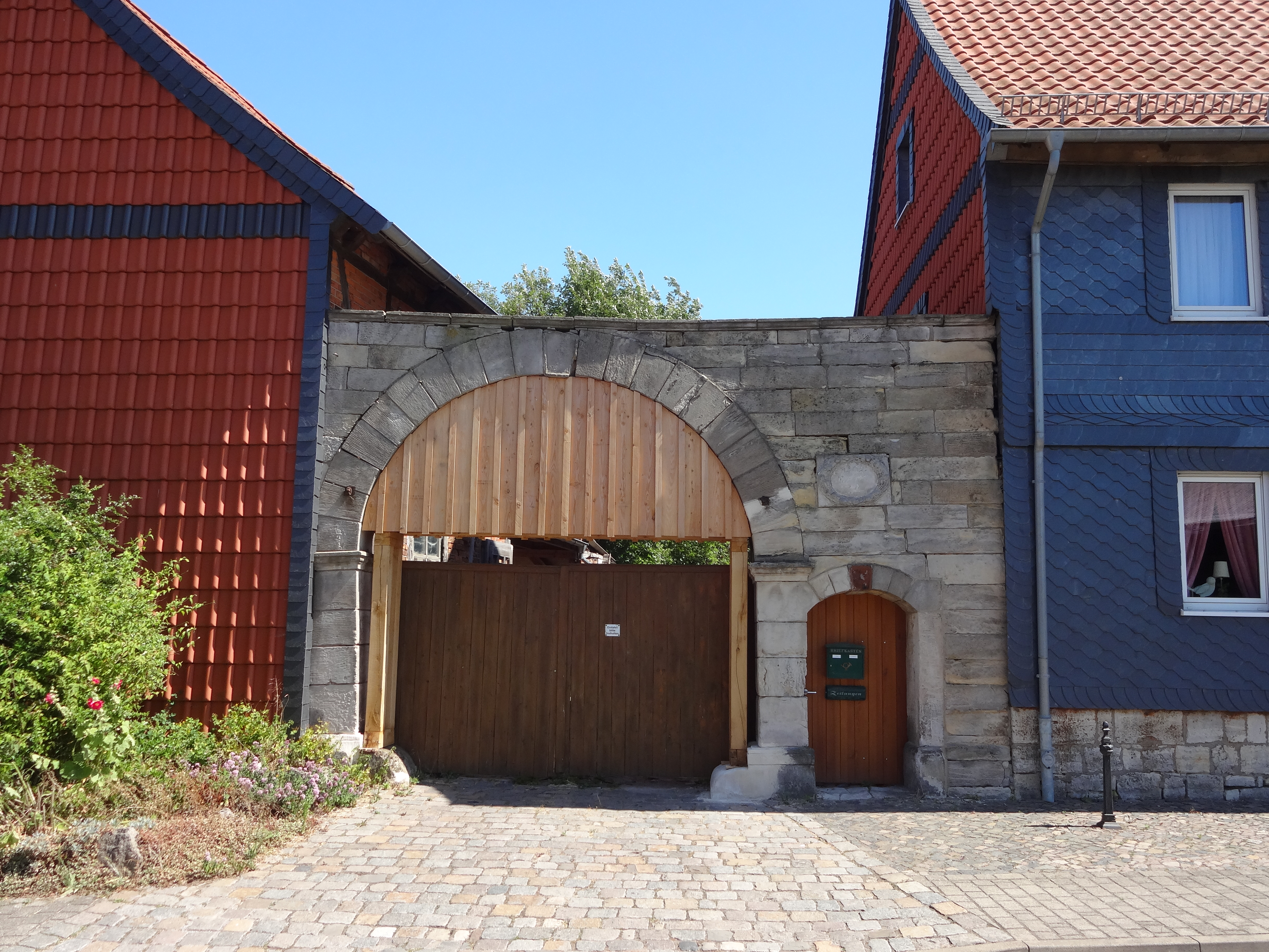 Bauernhof in der Ernst-Thälmann-Straße 18 in Dedeleben mit denkmalgeschützte Toranlage